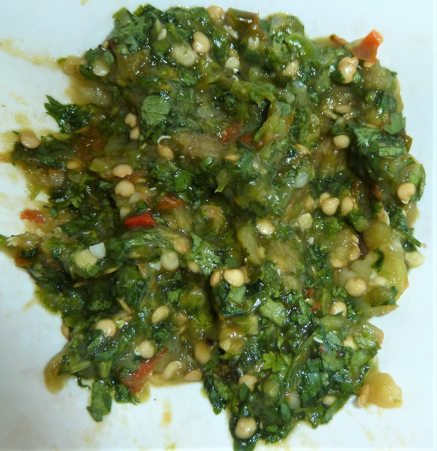 వంకాయ పచ్చిమిర్చి రోటి పచ్చడి